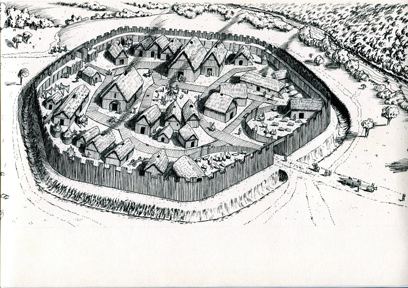 Germánská osada Starého Fryštátu